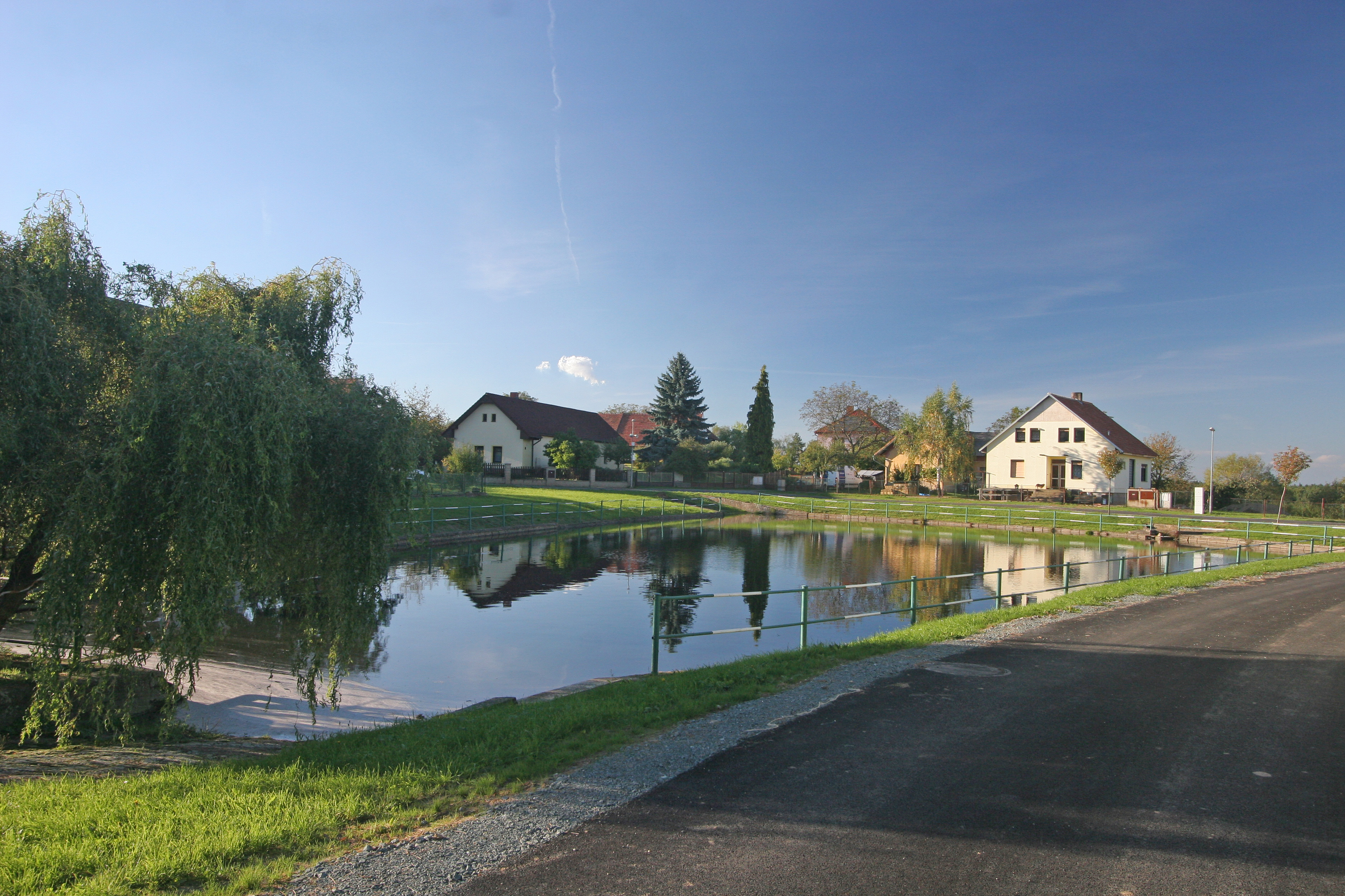 Turkovice návesní rybník